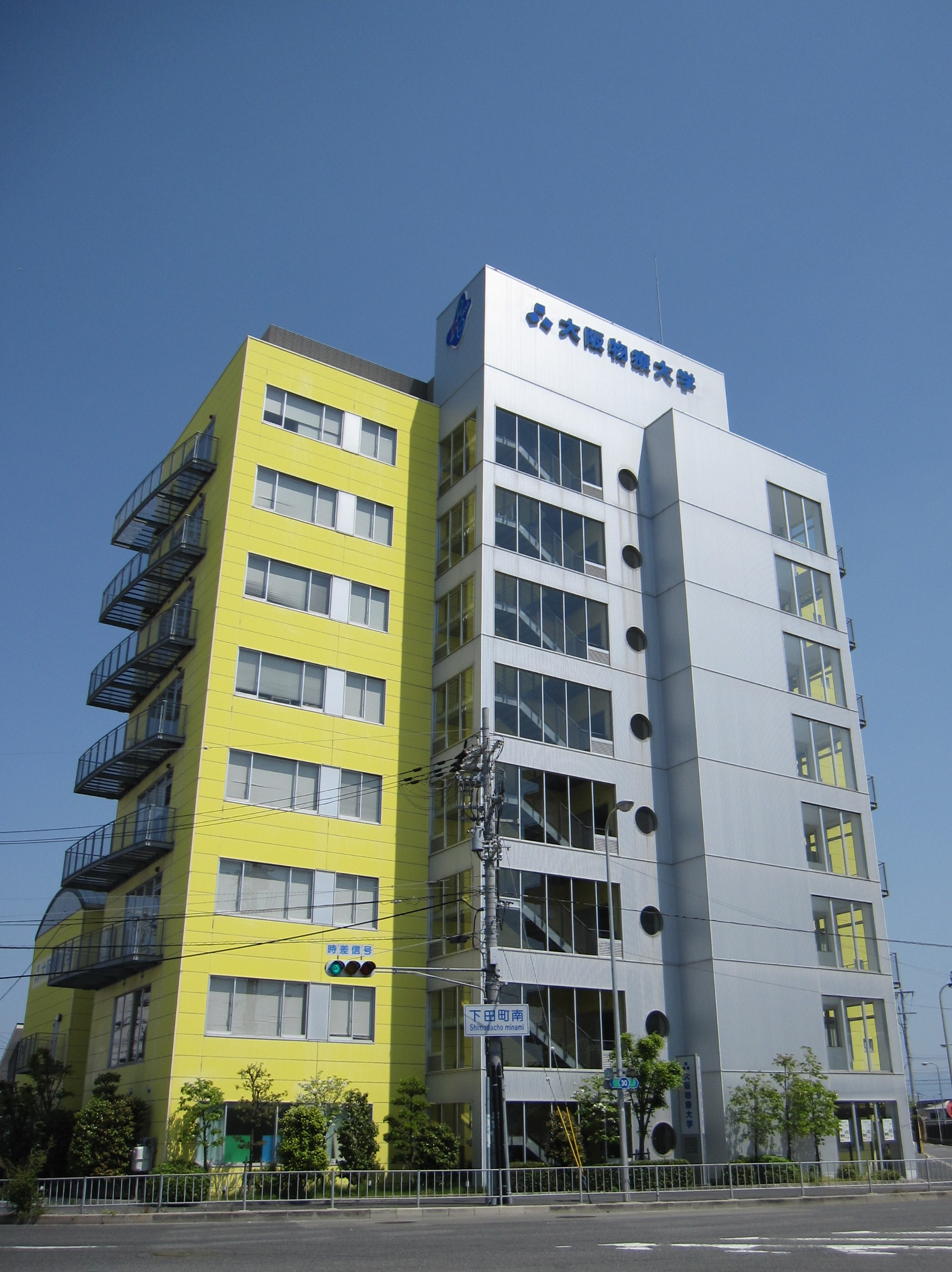 大阪物療大学